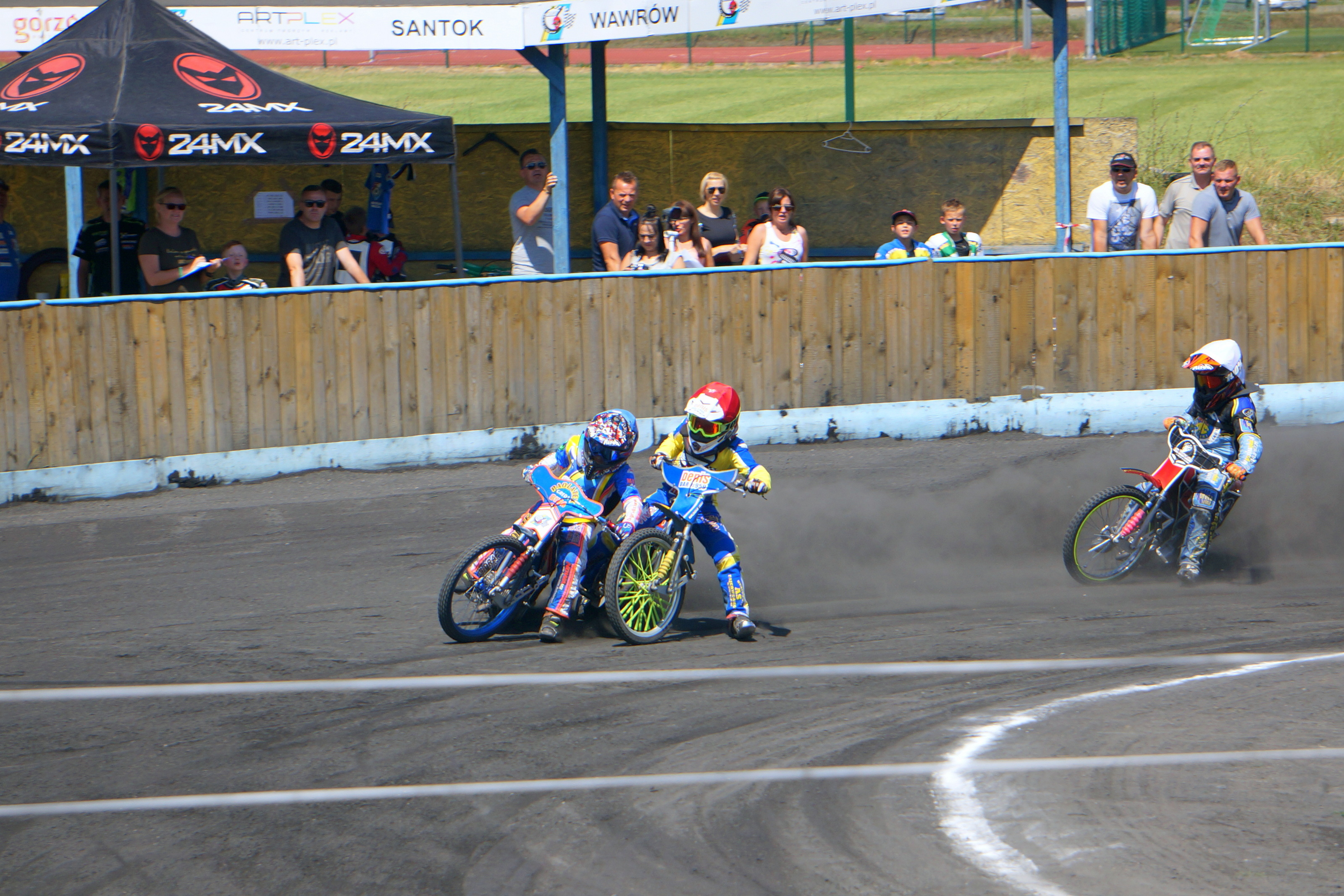 Dziesięcioletni żużlowcy JUST FUN GUKS Speedway Wawrów, Krystian Gręda (n) i Denis Andrzejczak (cz) podczas I rundy Drużynowych Mistrzostw Polski na mini torze żużlowym w Wawrowie w 2018 r.